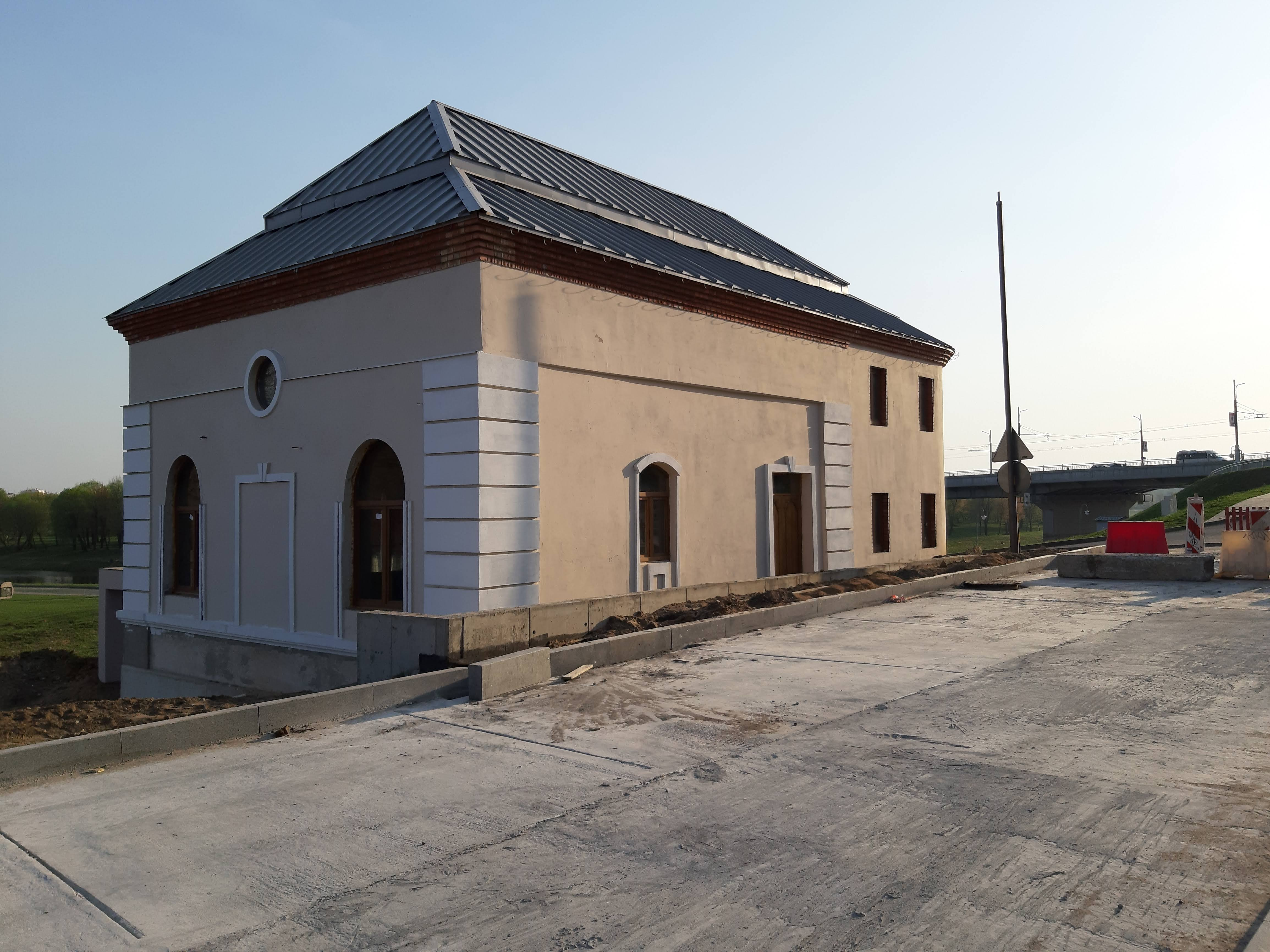 Магілёў. На Вялікай Грамадзянскай